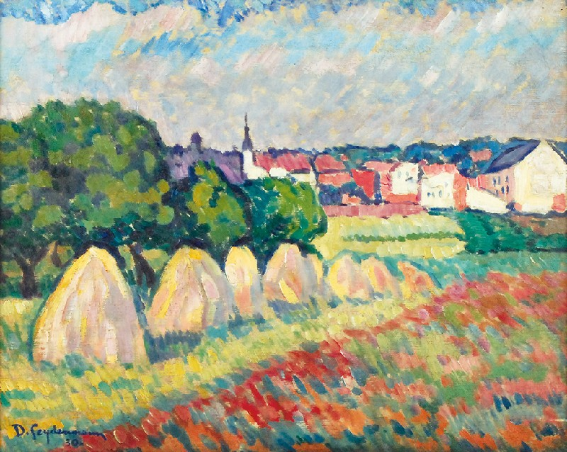 Lato